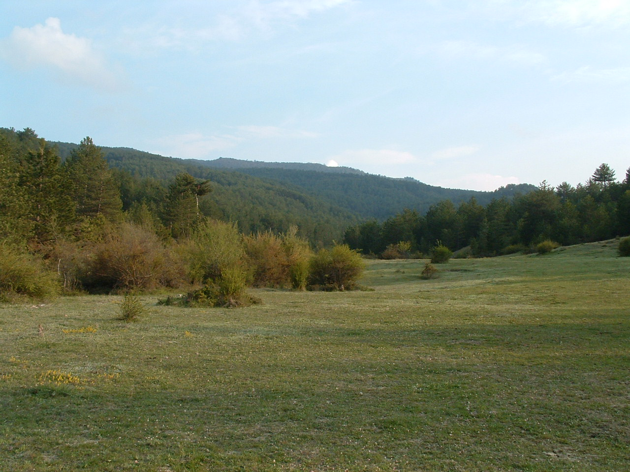 Mudurnu Babas mevkii